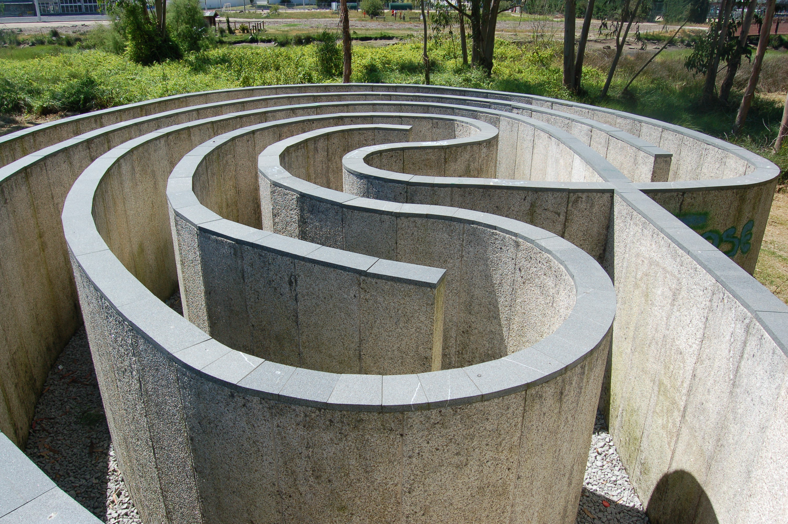 Laberinto de Pontevedra, estatua de Robert Morris na Illa das Esculturas Categoría:Imaxes de Pontevedra